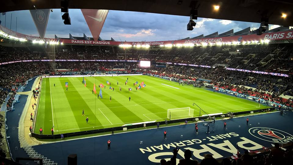 Le Paris Saint-Germain reçoit l'AS Monaco au Parc en Coupe de France le 26 avril 2017.